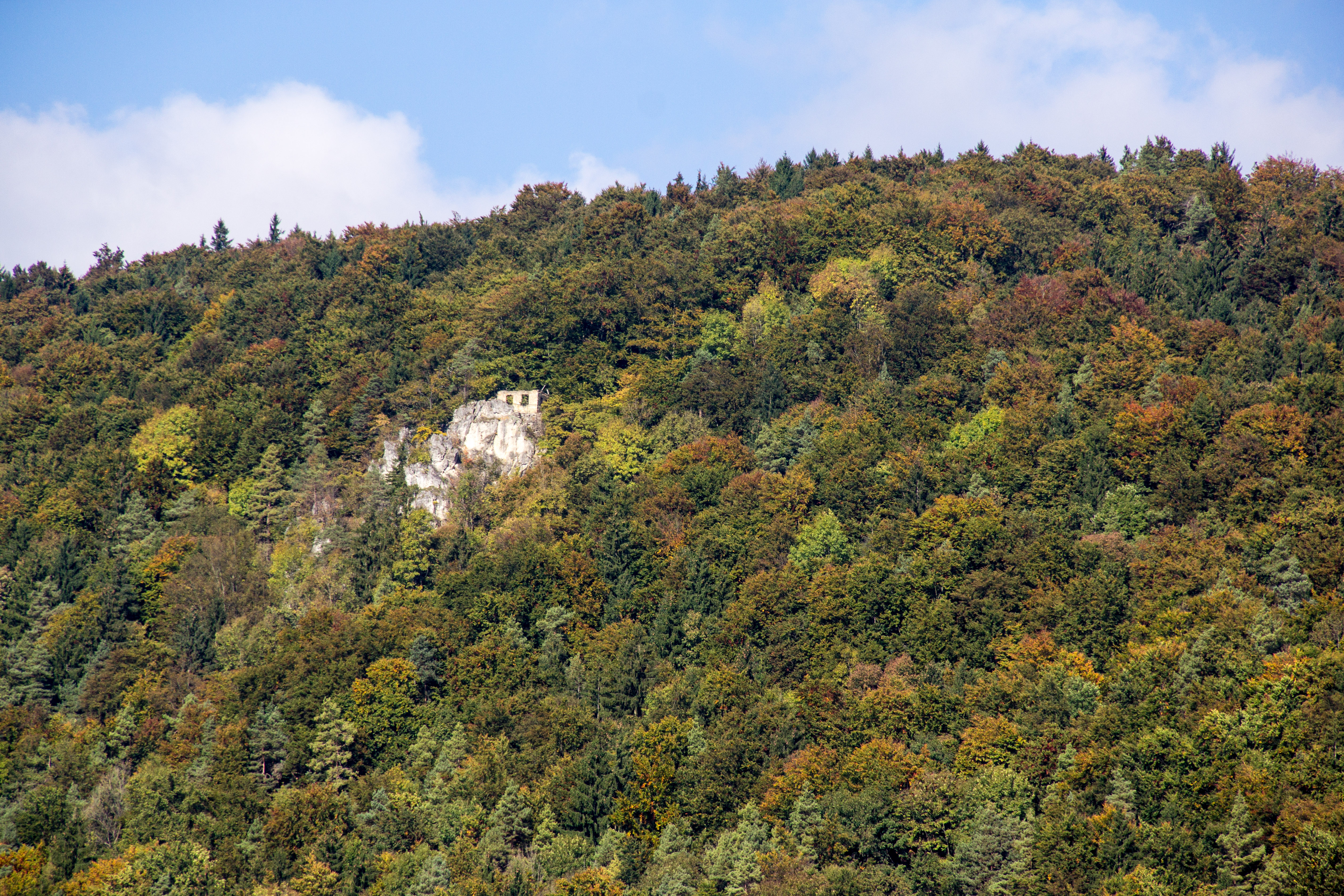 Wasserbergfelsen, Kapuzinersessel, Geotop, Felsnadel, Happurg